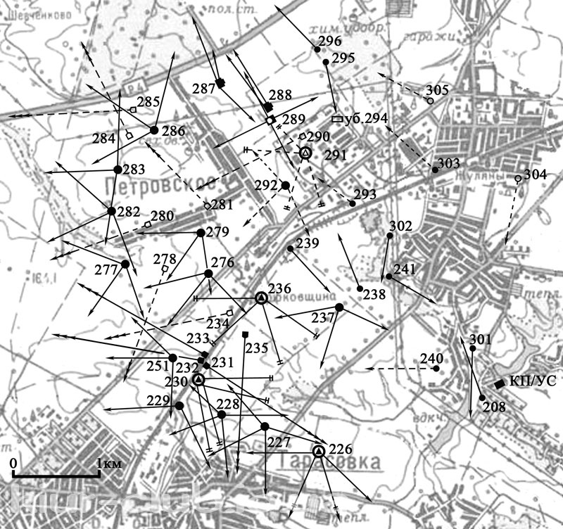 Схема БРО 5 Київського укріпленого району, викладена у вільний доступ авторами книги "Киевский укрепленный район 1928—1941" (